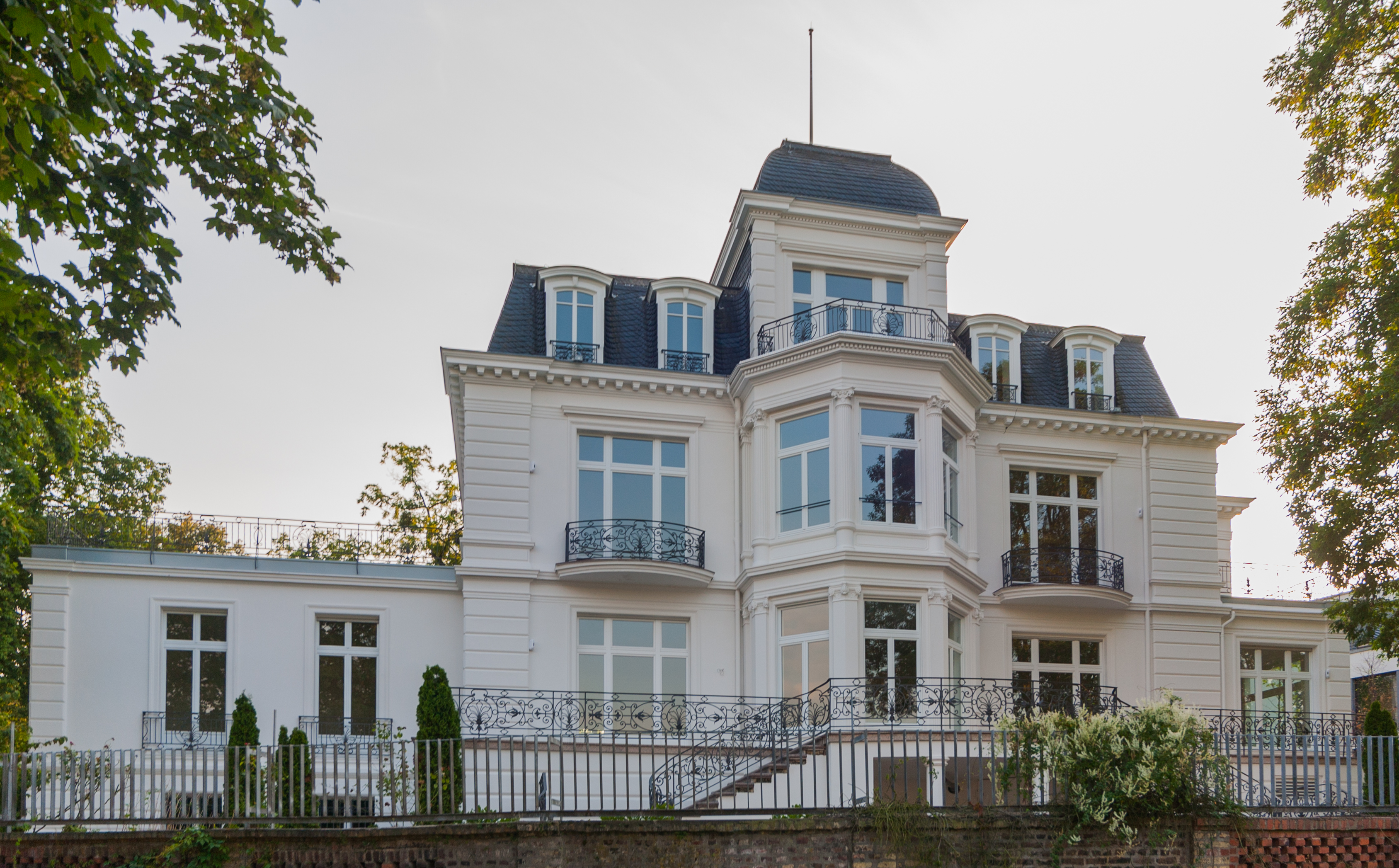 Haus Steineck, Rüdigerstraße 82, Bonn: Ansicht von der Rheinseite (Nord-Ost), John-Jay-McCloy-Ufer